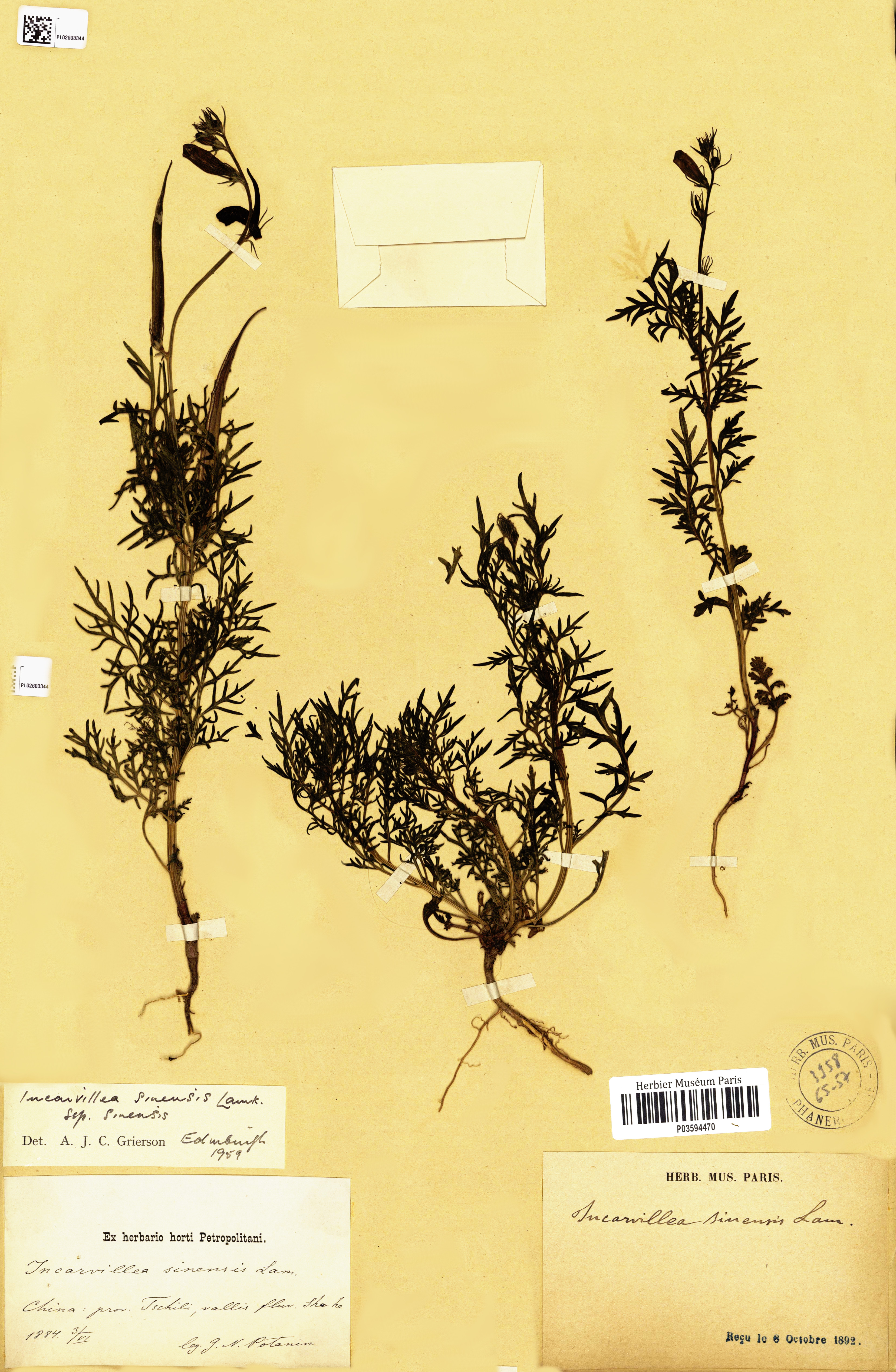 Muséum national d’Histoire naturelle, Paris (France) Collection : Plantes vasculaires (P) Spécimen P03594470